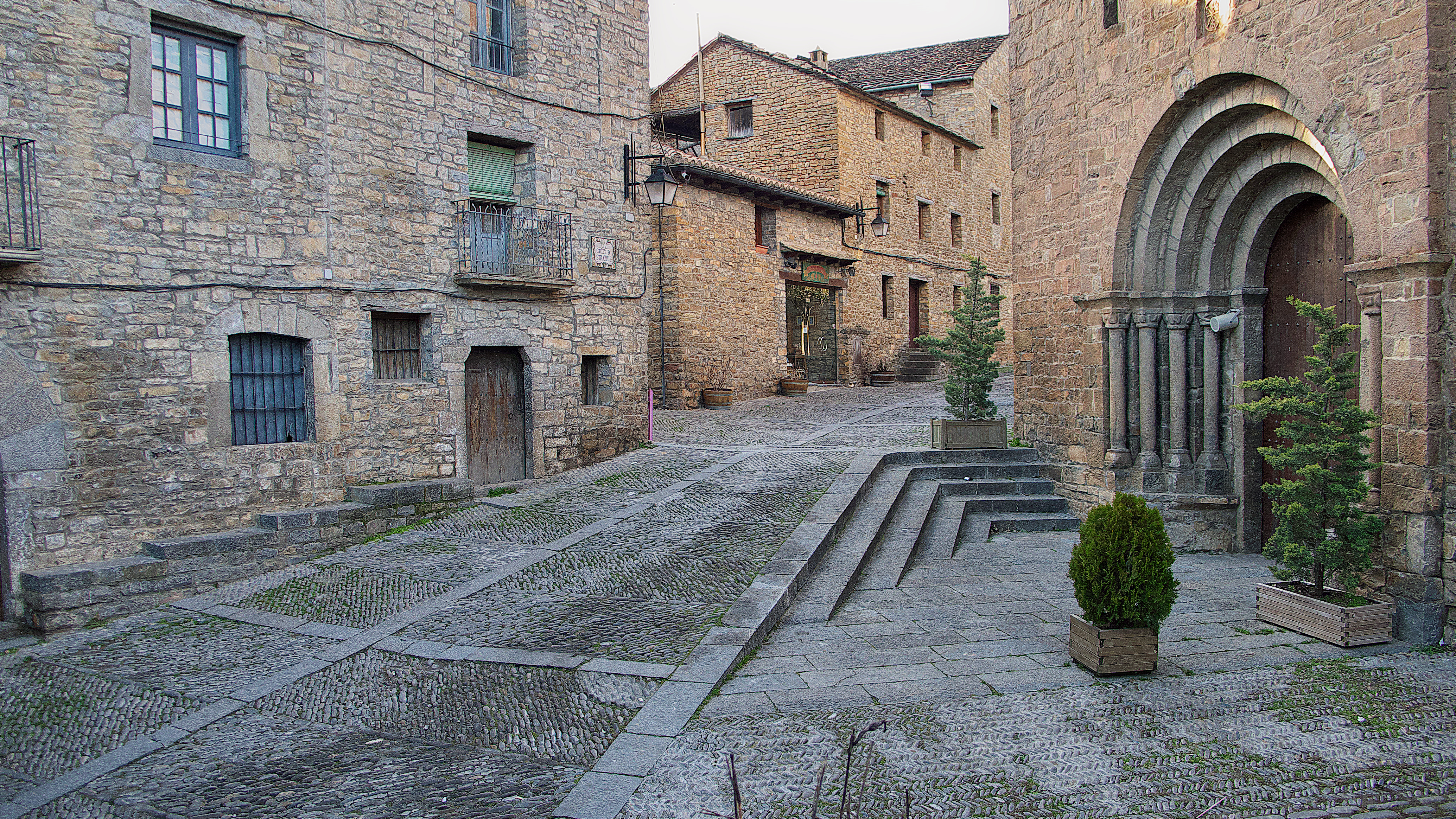 Vista de la puerta de Santa María (ss. XI-XII)